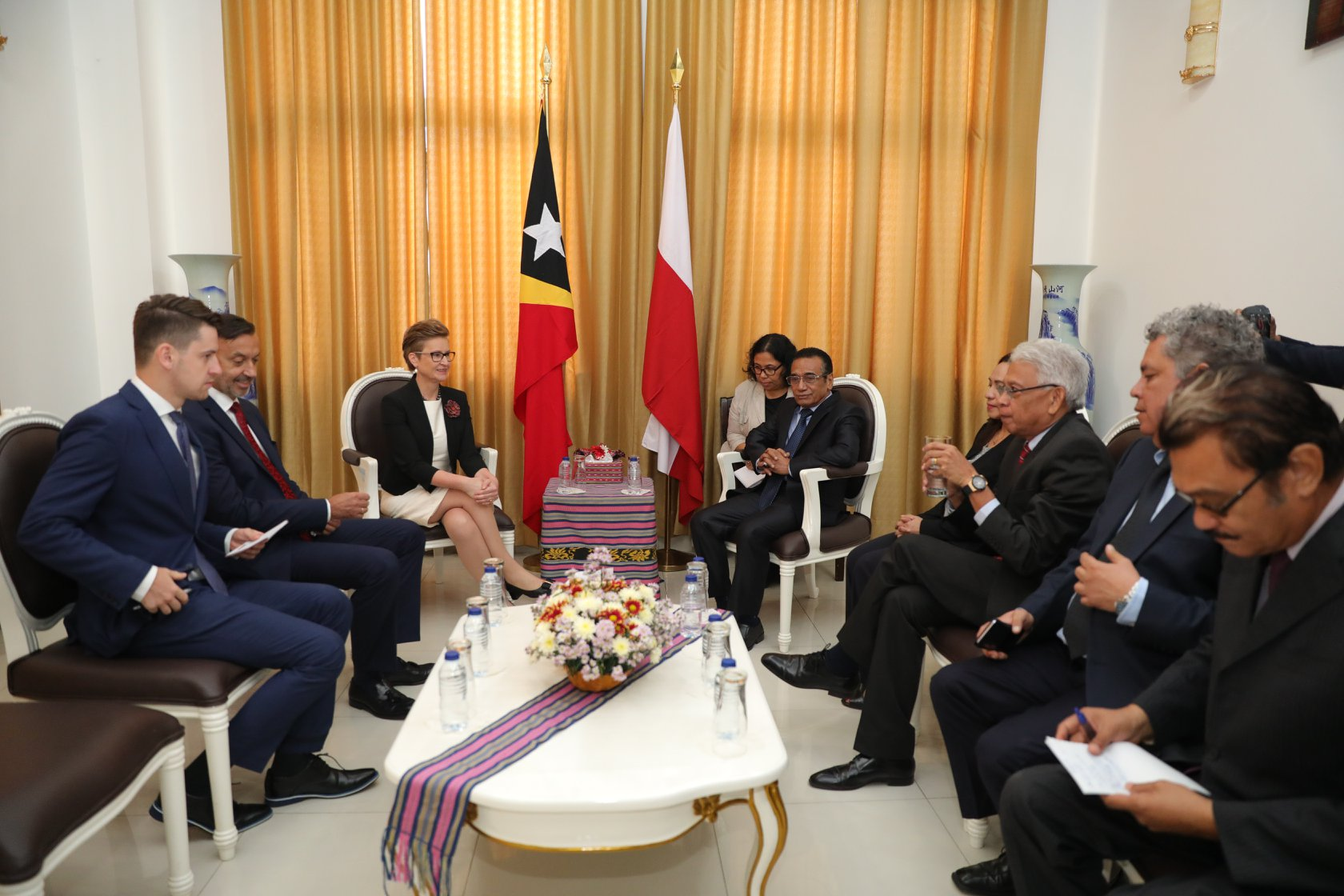 Präsident Francisco Guterres nimmt die Akkreditierung der neuen Botschafter in Osttimor entgegen: Finnland: Jari Sinkari Vereinigtes Königreich: Owen John Jenkins Polen: Beata Stoczynski Tetun: Prezidente Repúblika Francisco Guterres Lú Olo, ohin, simu karta kredensiál husi Embaixadór Finlandia, Jari Sinkari, Embaixadór Reinu Unidu, Owen John Jenkins, no Embaixadora Polónia, Beata Stoczynski atu hametin liután kooperasaun no amizade ho Timor-Leste.